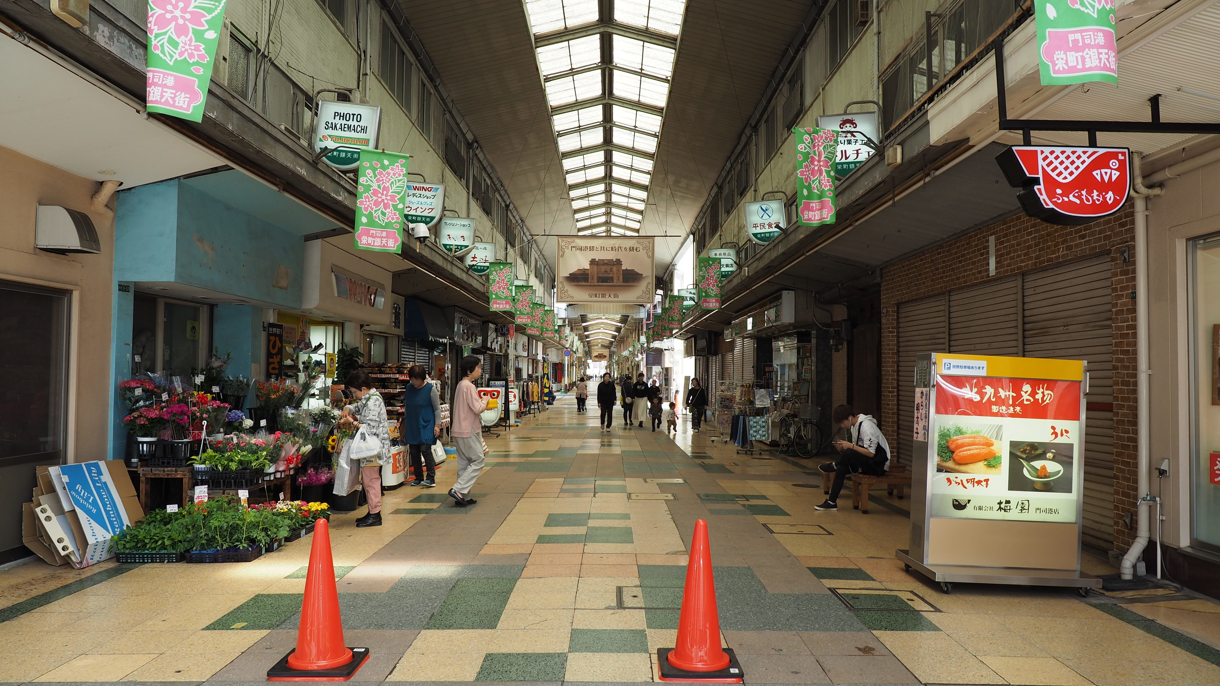 2019年5月撮影。